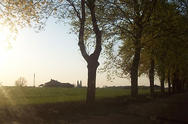 Henryków